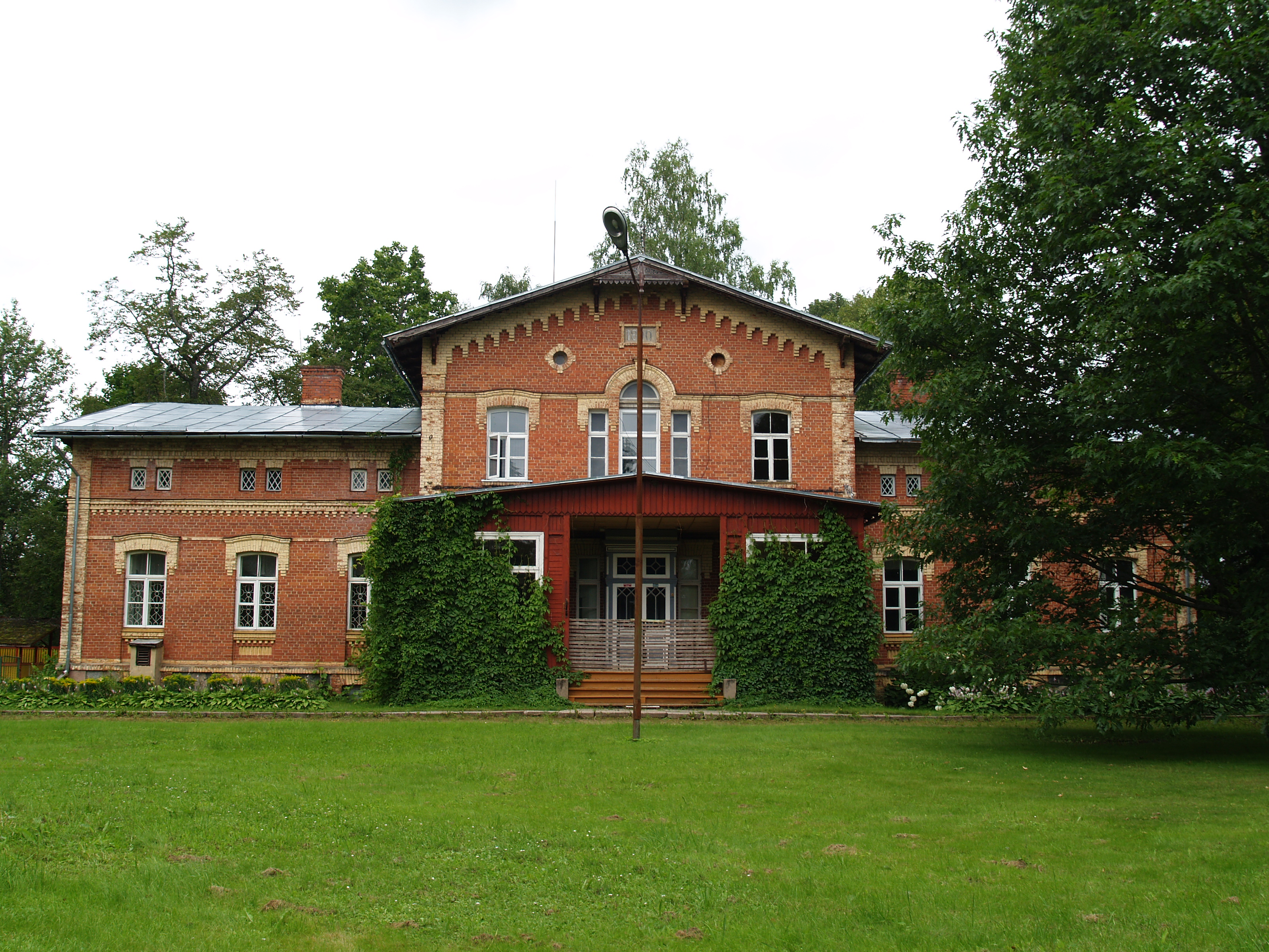 Viki mõis